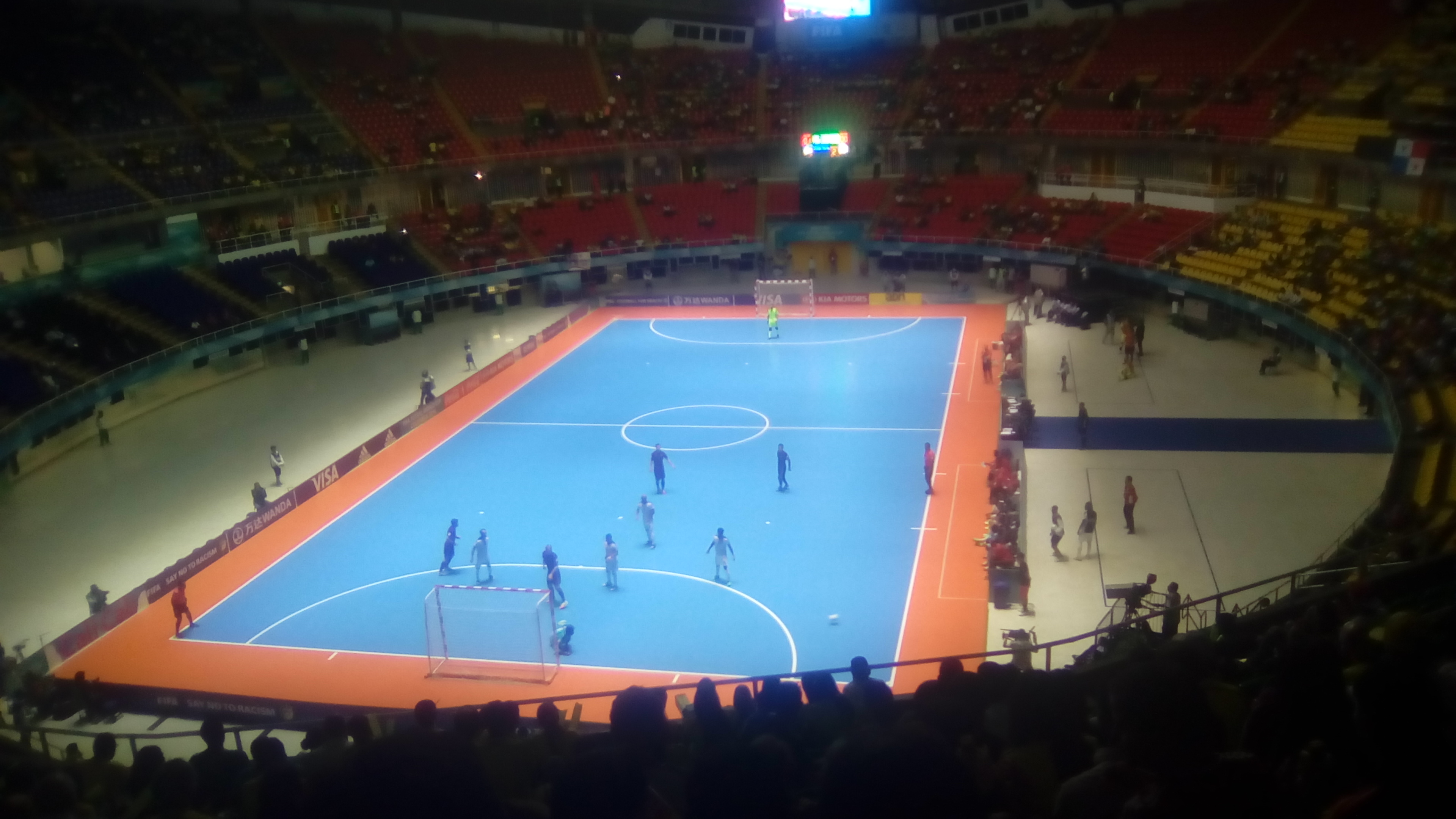 Partido por la tercera fecha del grupo B del Mundial de Fútsal de la FIFA. Rusia venció a Cuba 7-1 y se clasificó a la siguiente fase.